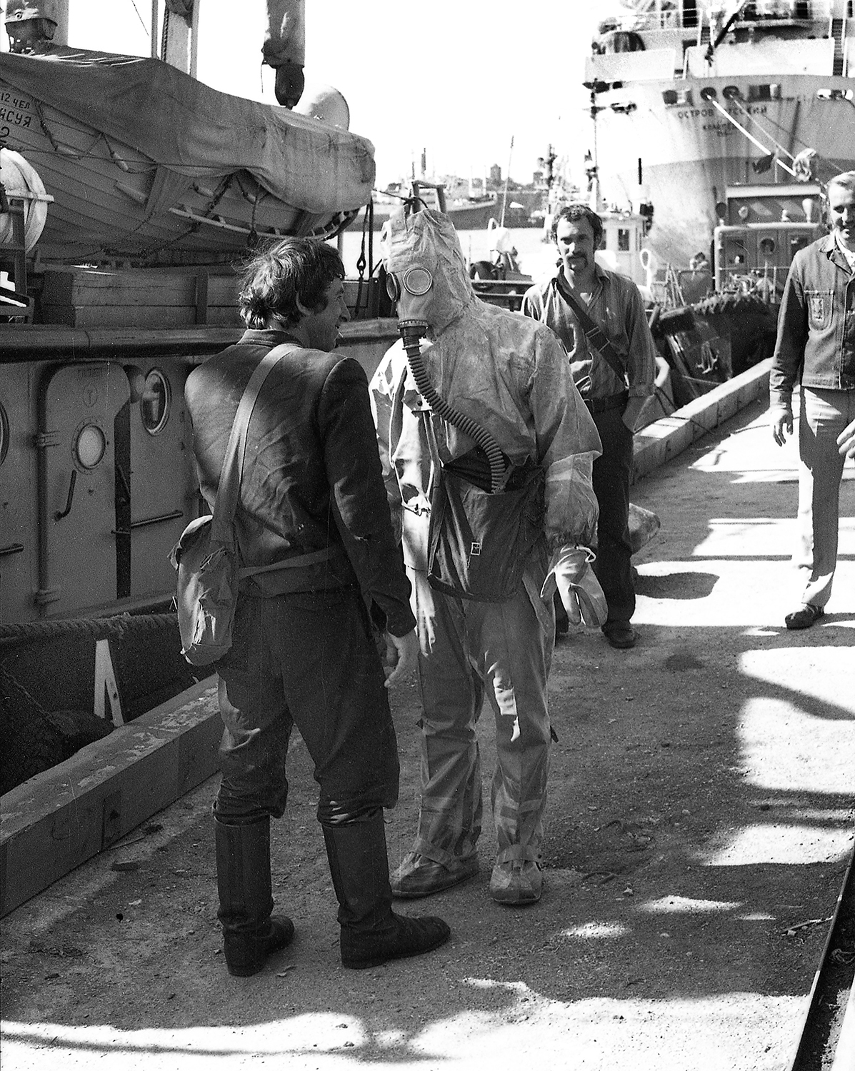 Gaasikaitse õppus Tallinnas Paljassaare sadamas. Taustal on päästelaev "Tasuja".